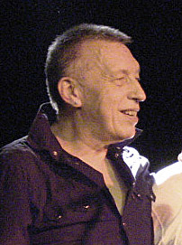 Hans Reffert